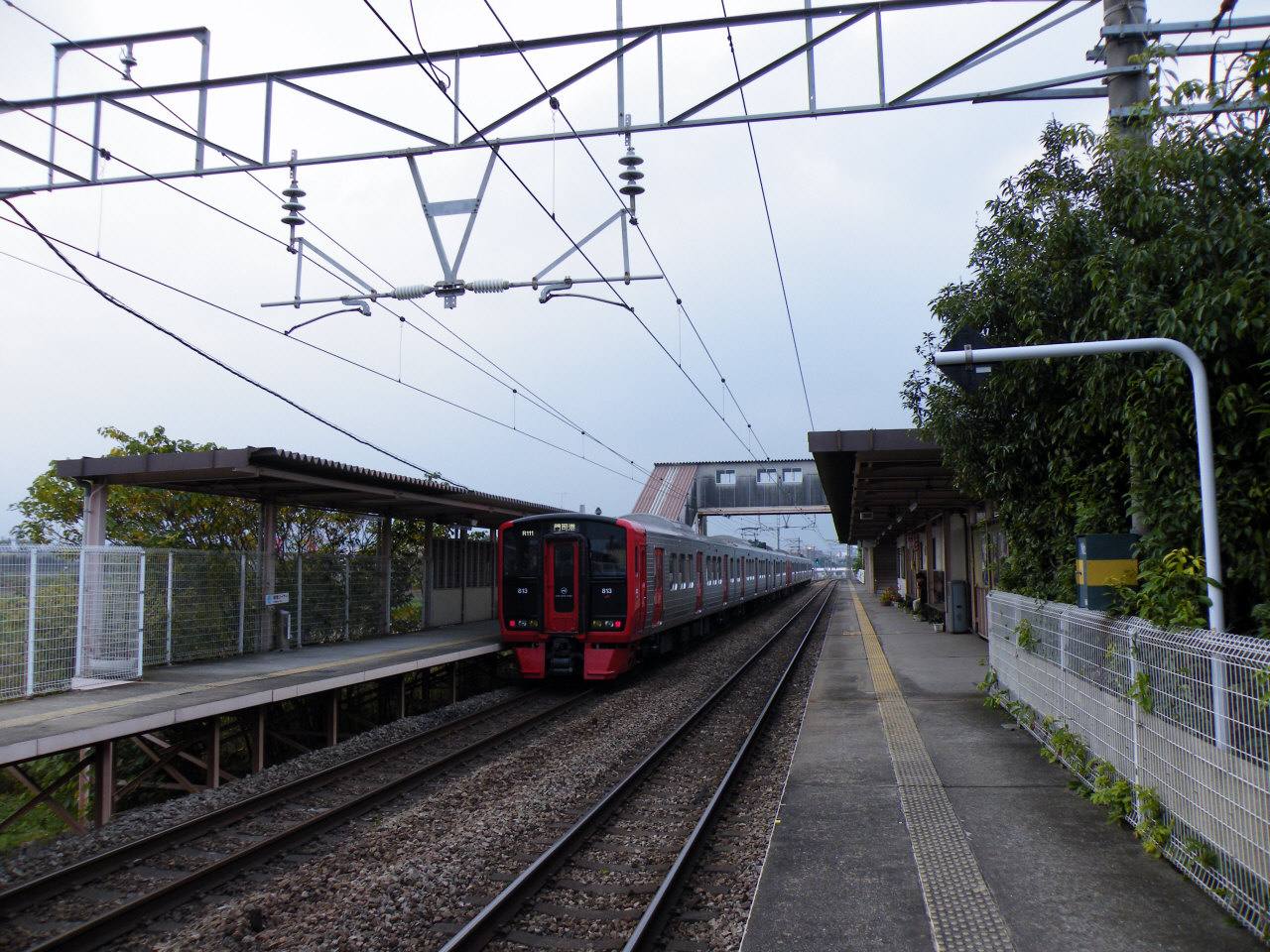 JR九州都府楼南駅構内